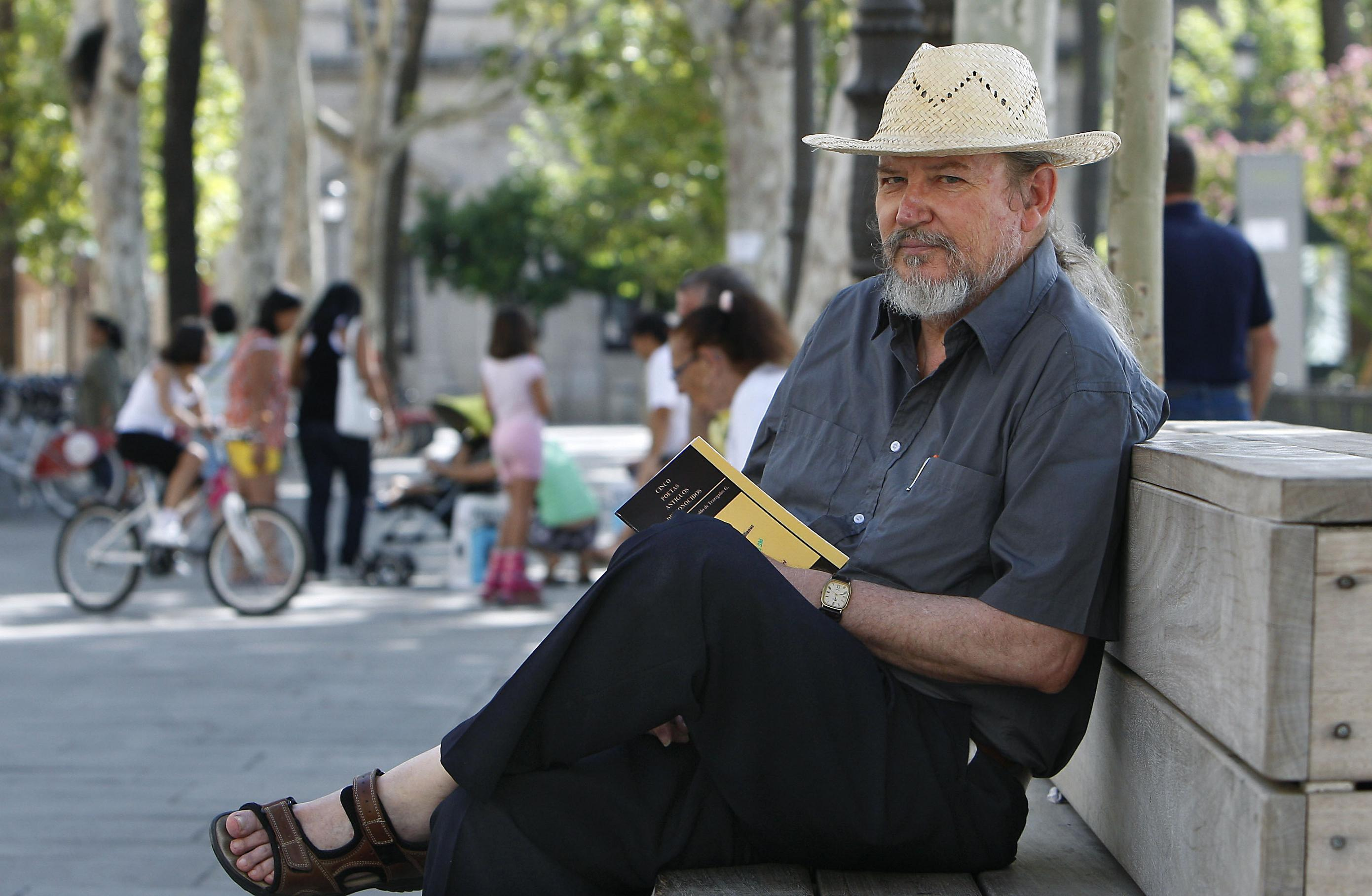 En la plaza Nueva de Sevilla (España)